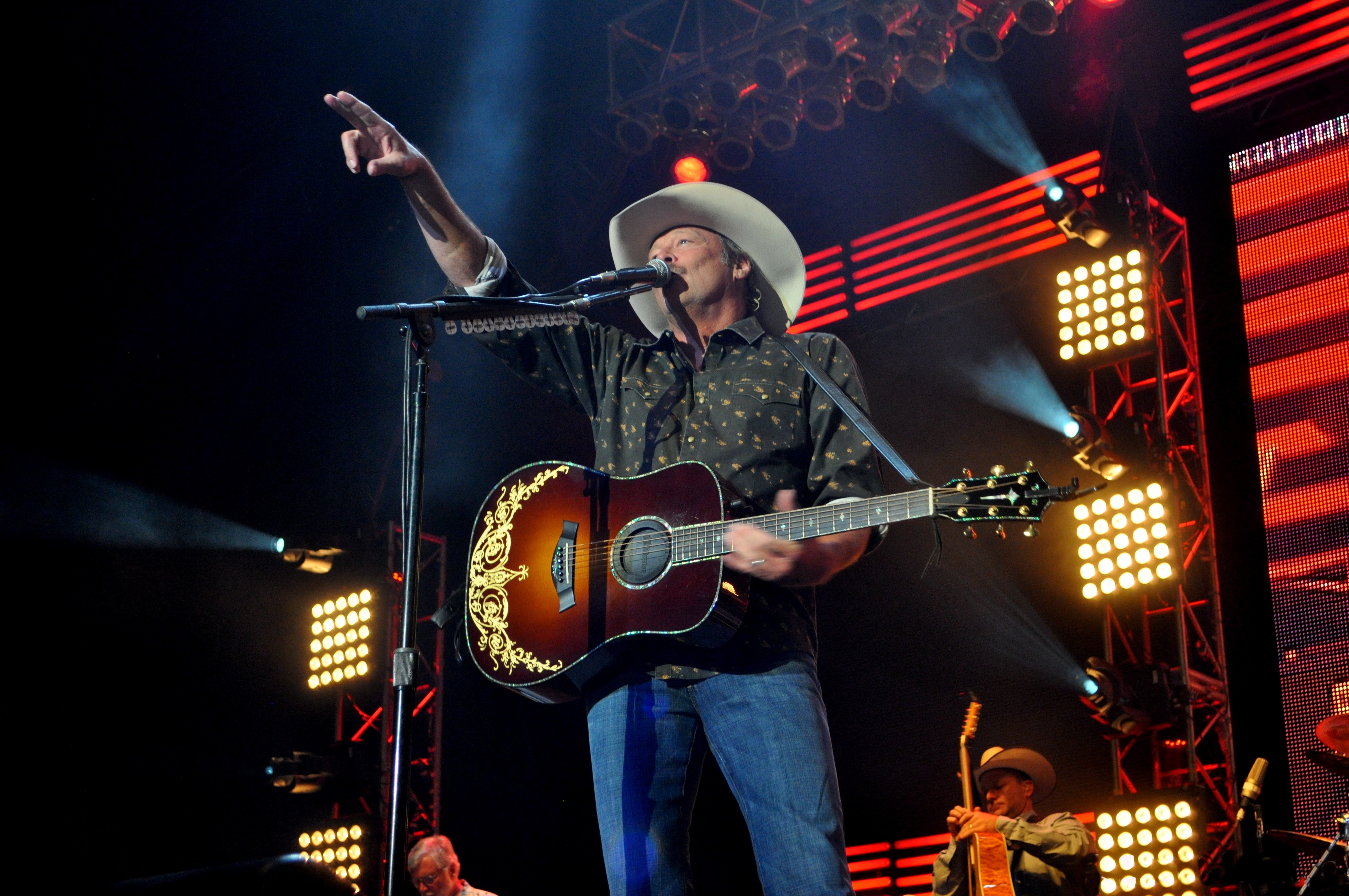 Alan Jackson -DSC_0077-8.24.12